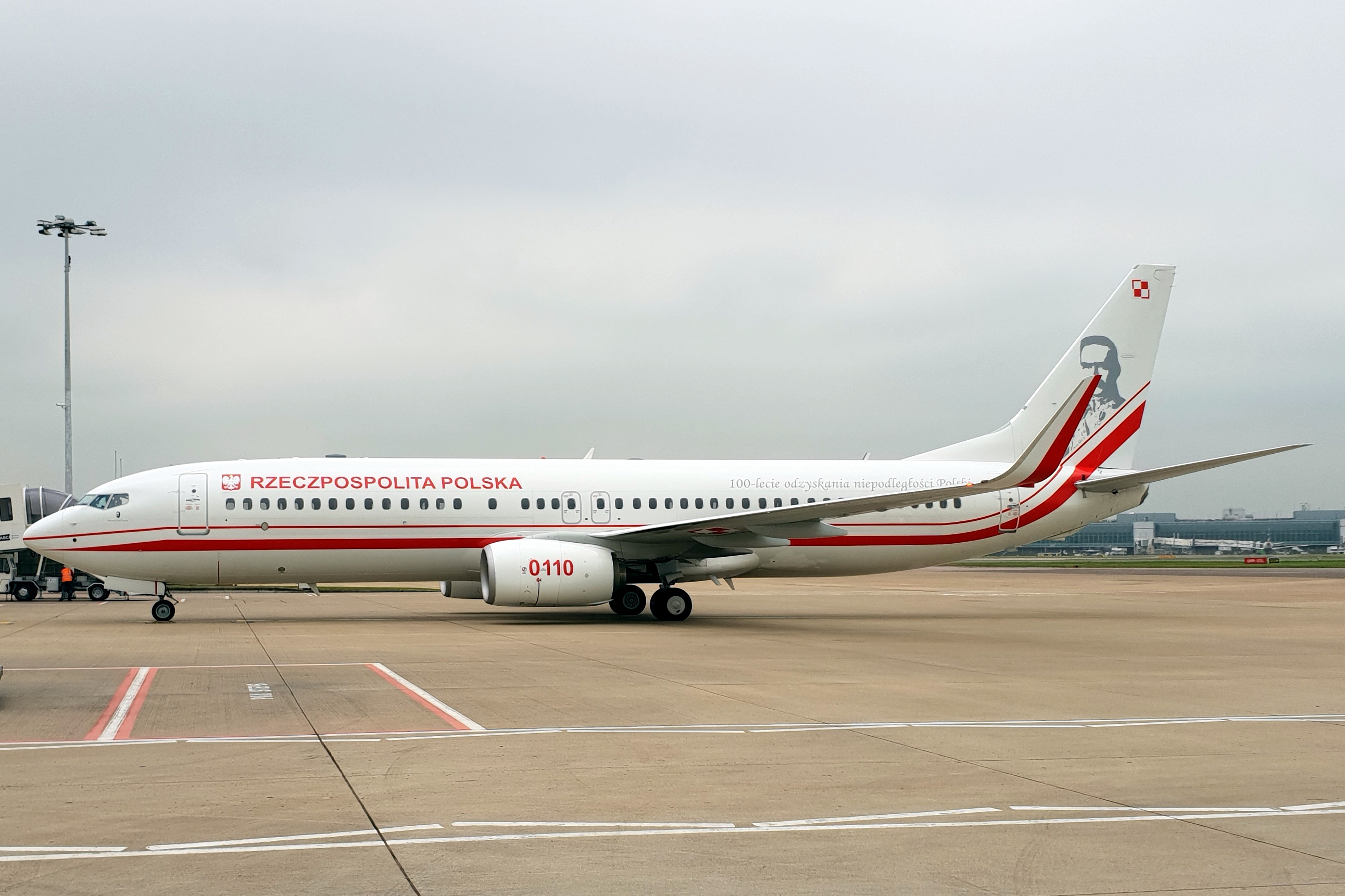 0110 30052018LHR